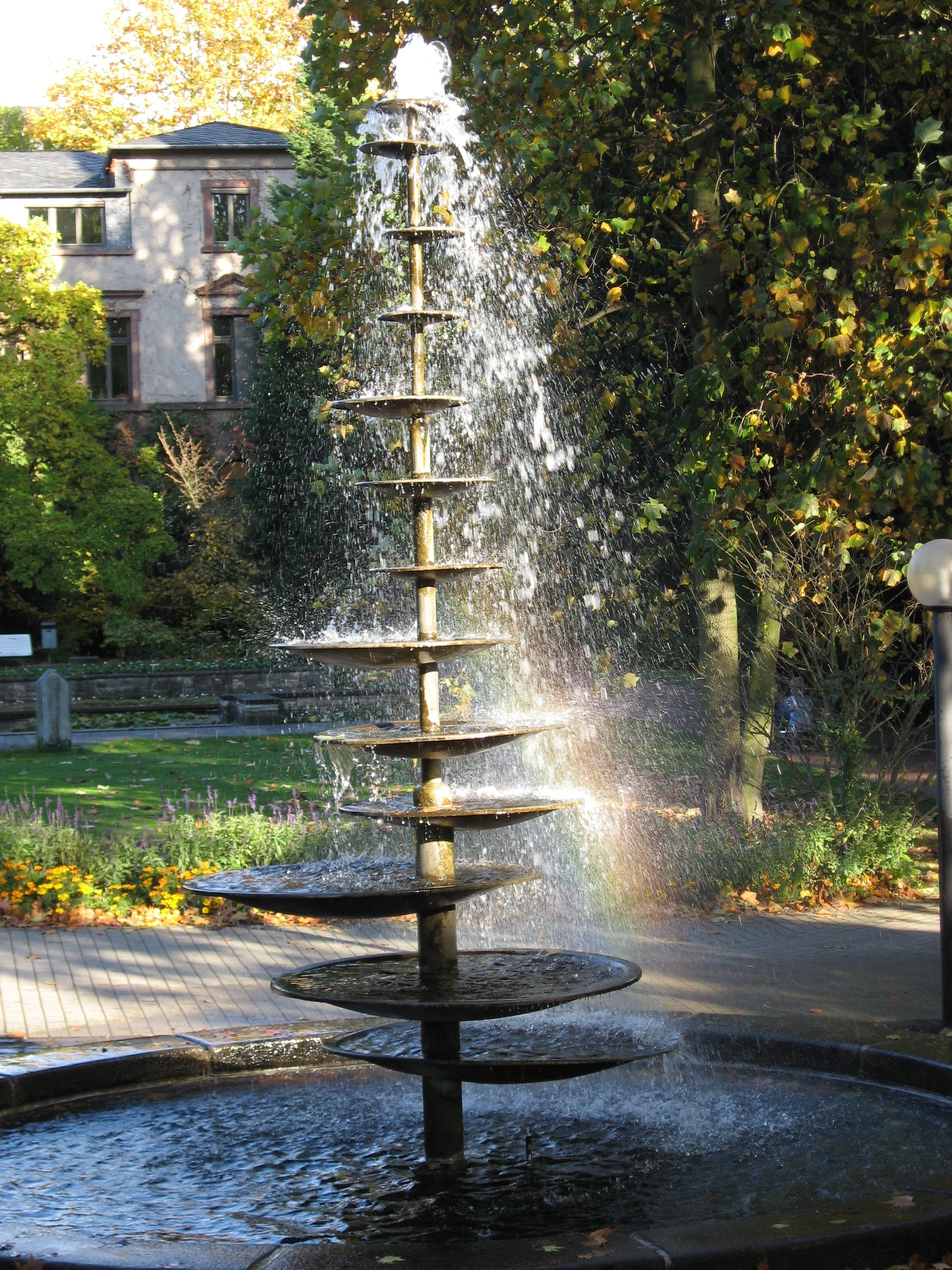 Springbrunnen im Frankfurter Palmengarten